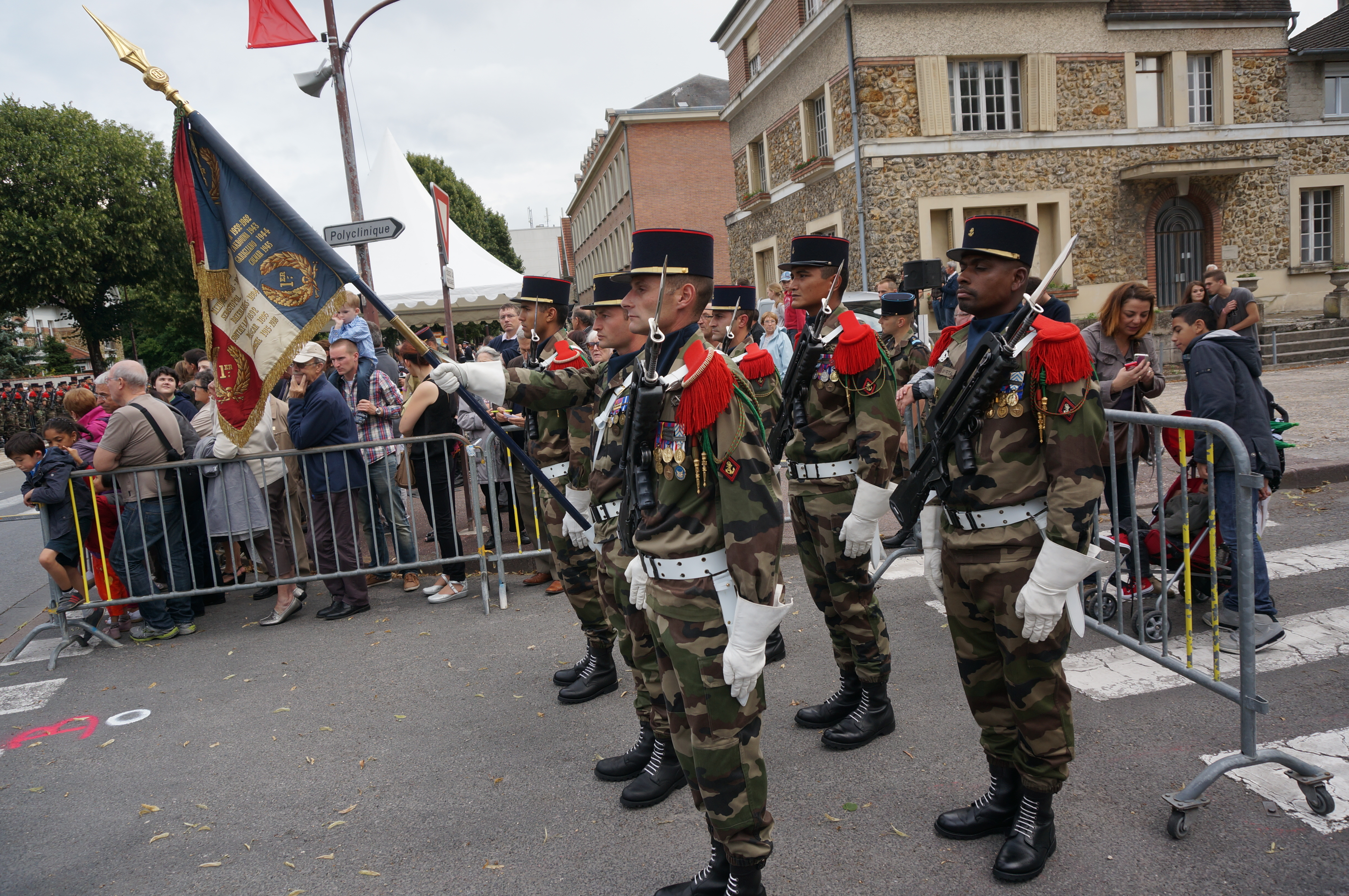 Drapeau_du 1e_Rima.